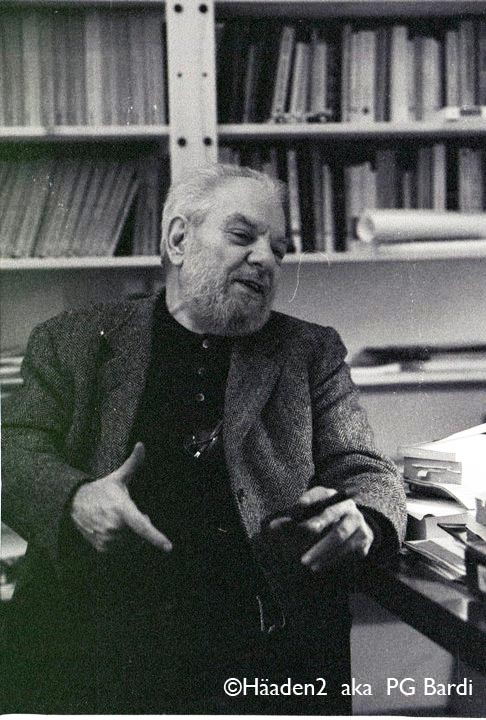 Roberto Leydi, Milano 1994